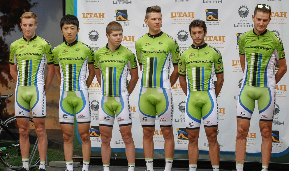 El Cannondale en la presentación del Tour de Utah 2013.